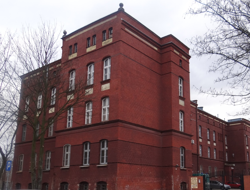 Grupa Zabezpieczenia 15 WOG w Stargardzie Szczecinskim